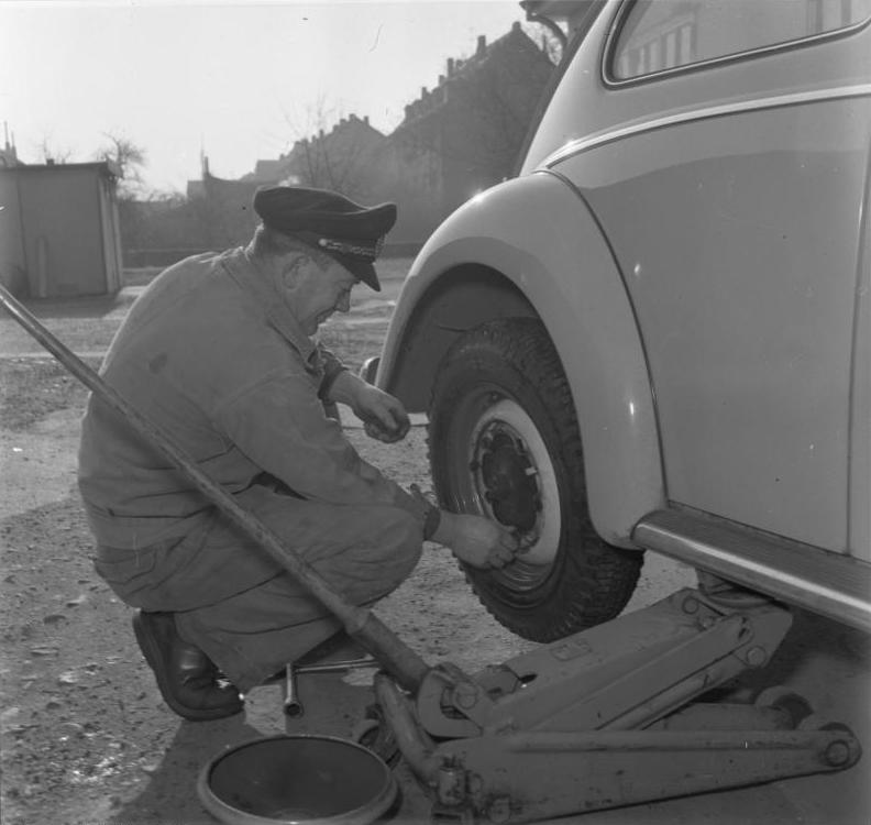 Reifenwechsel an einer Tankstelle